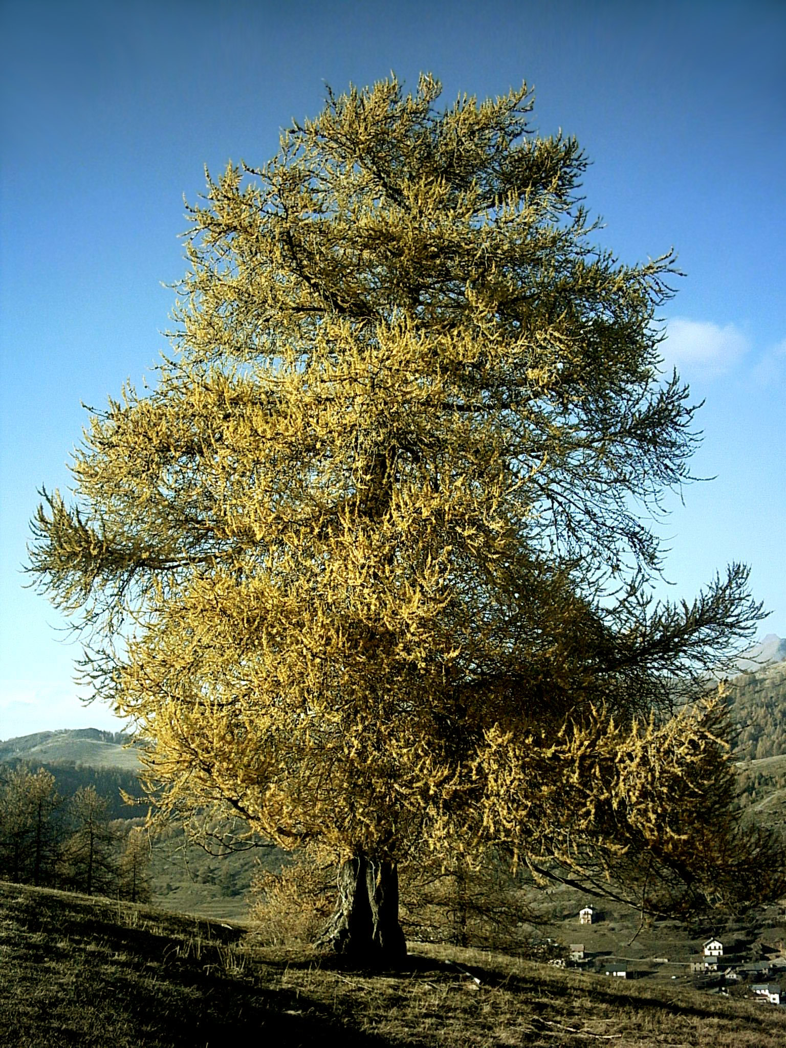 Beau Mélèze en automne, à Beuil, Alpes-Maritimes, France.